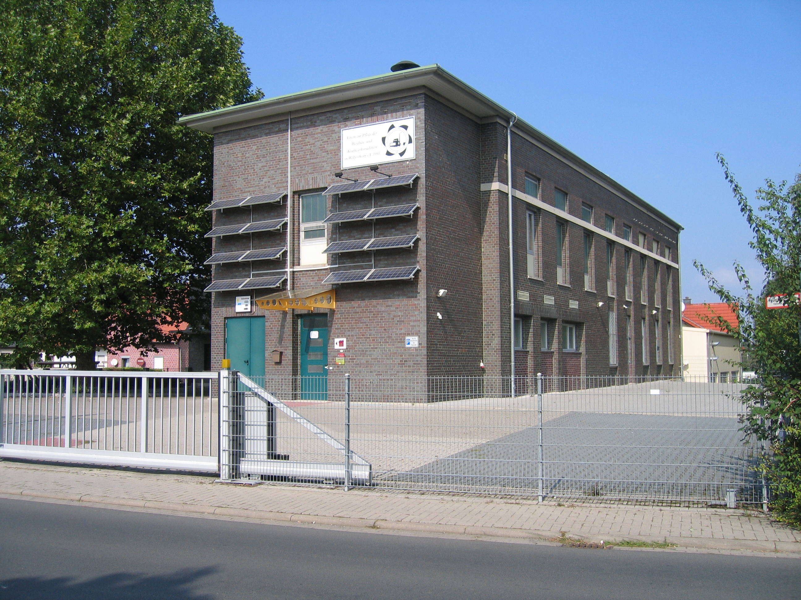 Ehemaliges Umspannwerk des ehemaligen Braunkohlekraftwerkes Wölfersheim. Das ehemalige Umspannwerk beinhaltet nun das Wölfersheimer Energiemuseum (WEM). Lage: Seestraße 11 Errichtet: 1920er Jahre